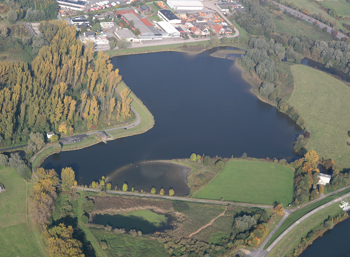 Dies ist ein Luftbild des Radbodsees in Hamm-Bockum-Hövel.